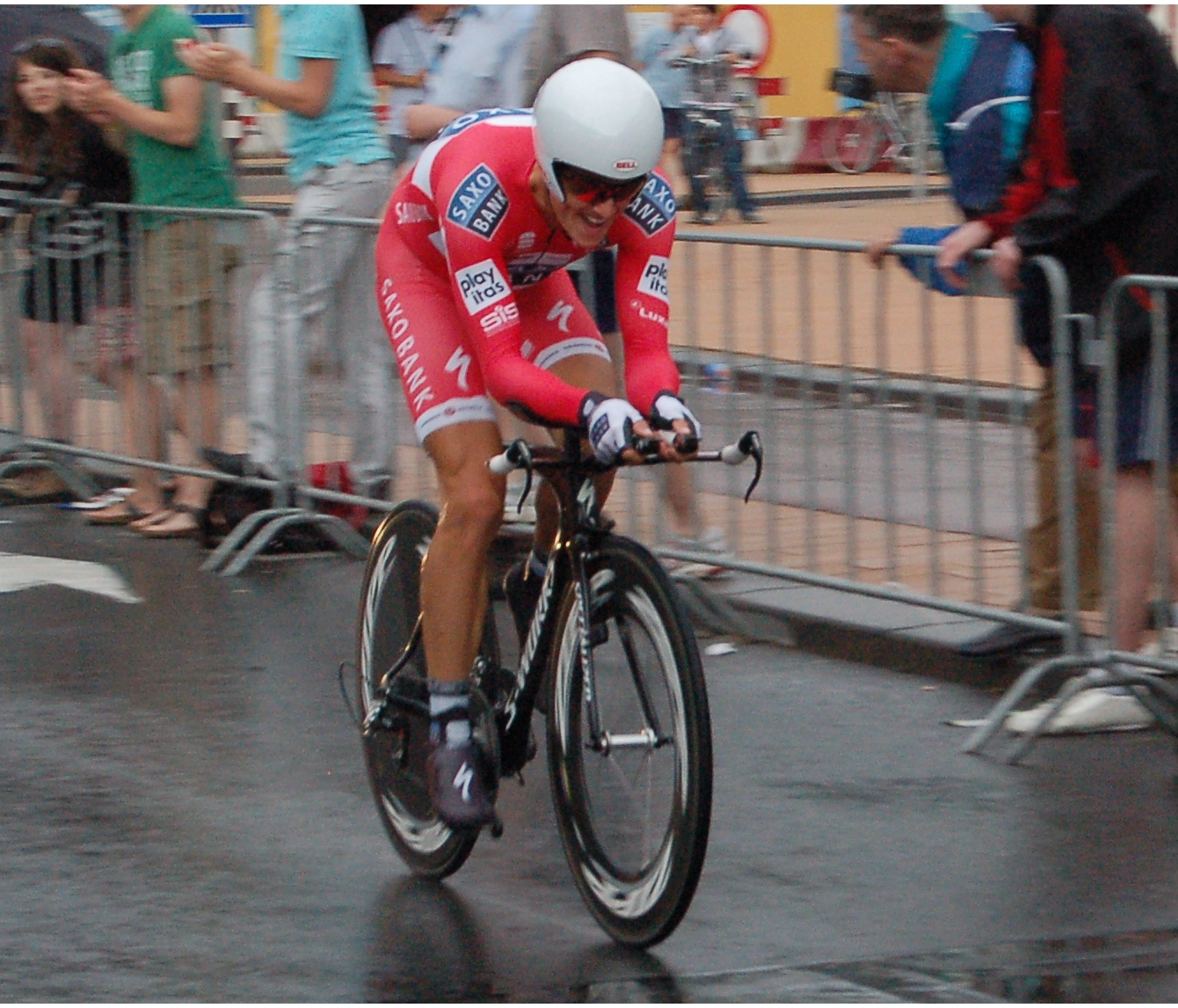 Prologue du Tour de France 2010 à Rotterdam - Jakob Fuglsang